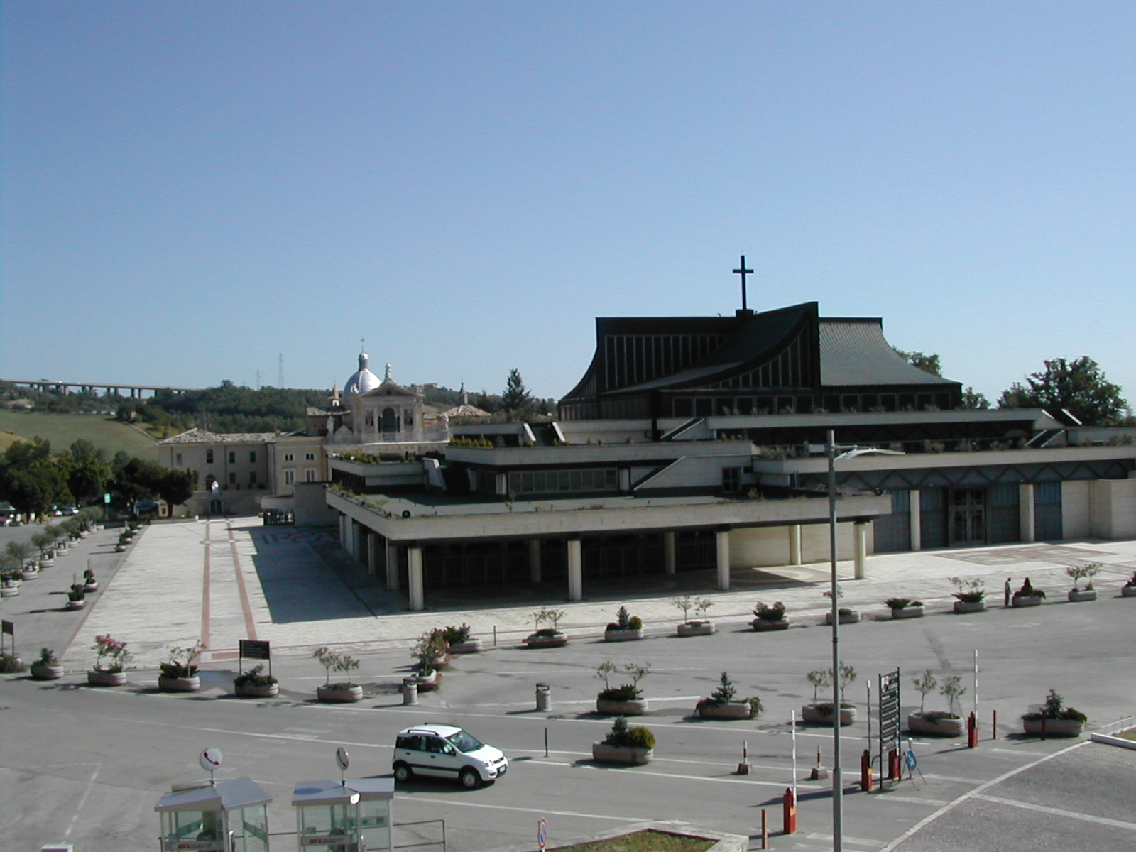 Santuario di San Gabriele dell'Addolorata ad Isola del Gran Sasso d'Italia, in Italia